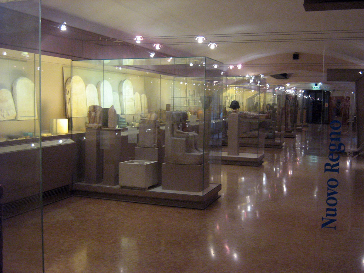 Salas egipcias del Museo Cívico Arqueológico de Bolonia